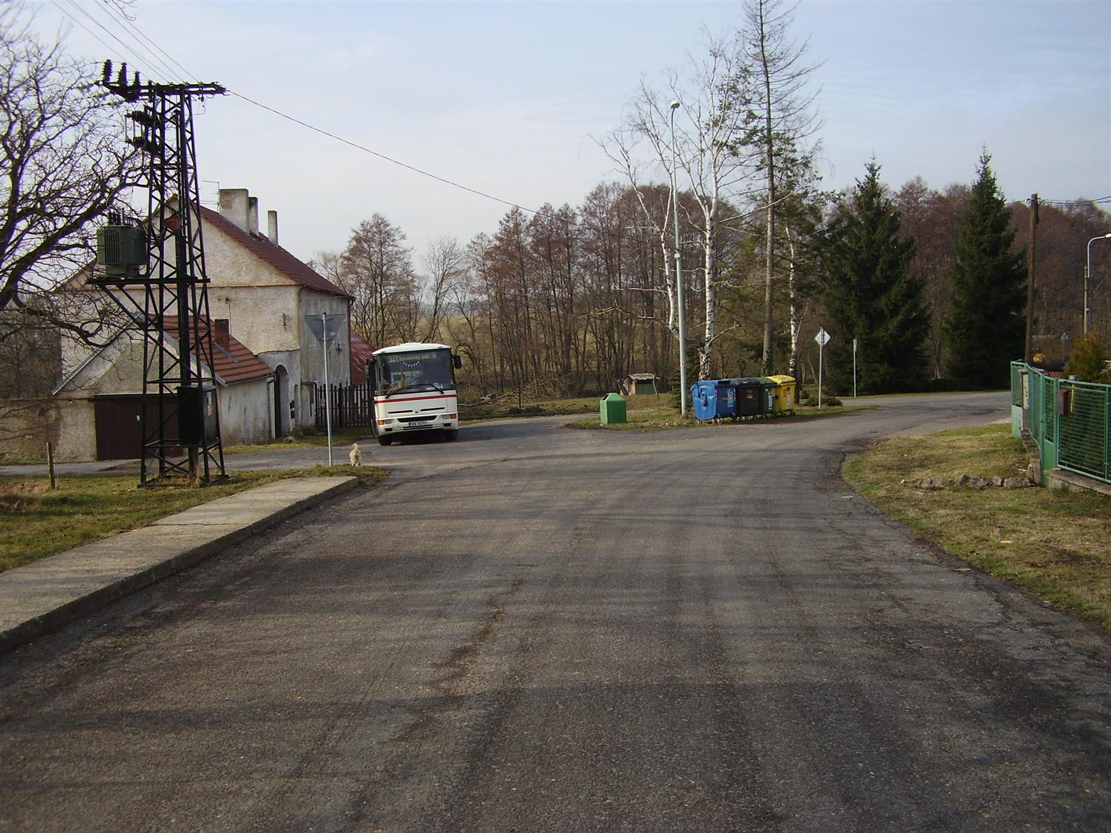 Autobusová točna na konci Stříbrné lhoty u Mníšku pod Brdy